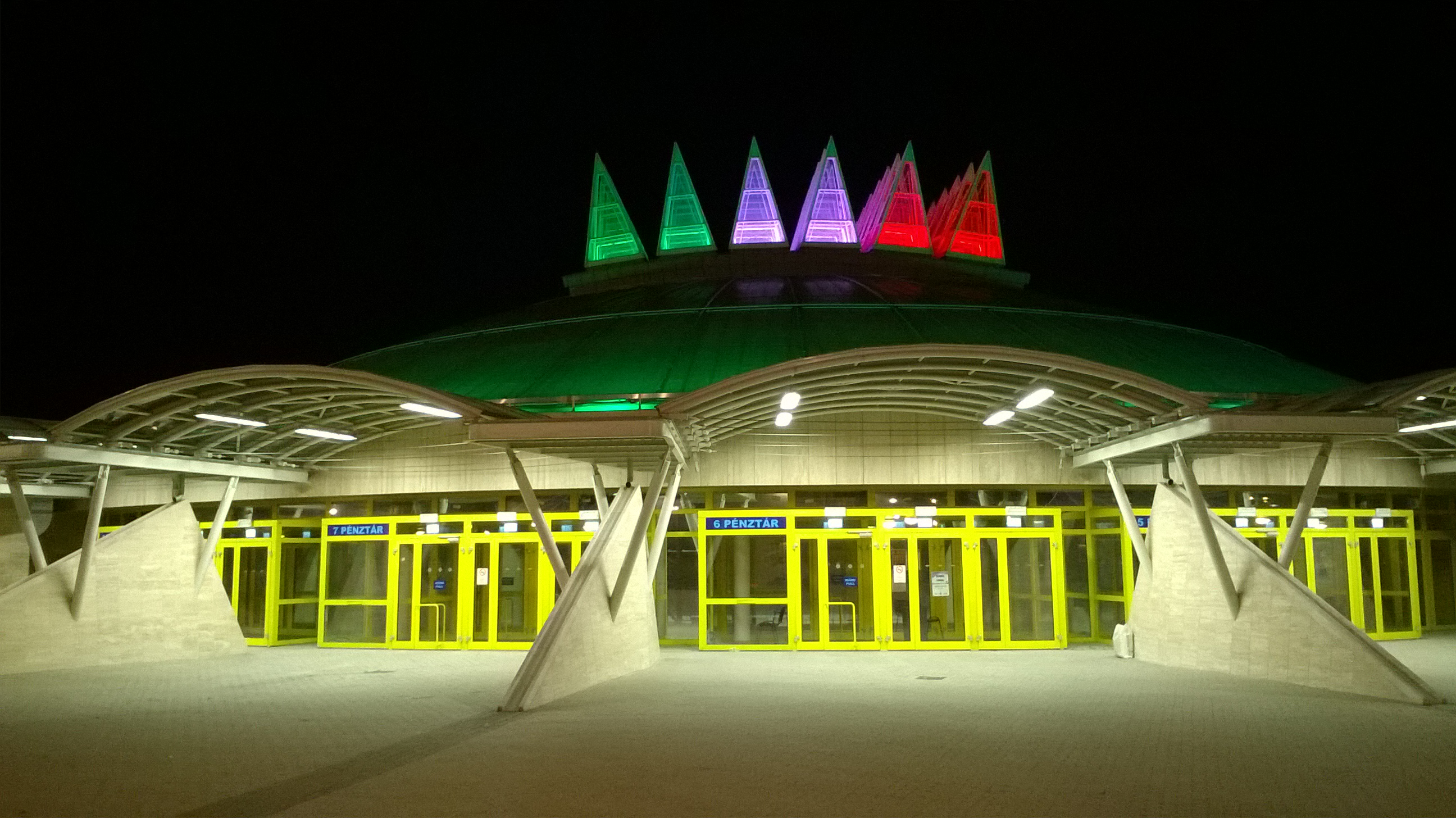 Budapest, Tüskecsarnok